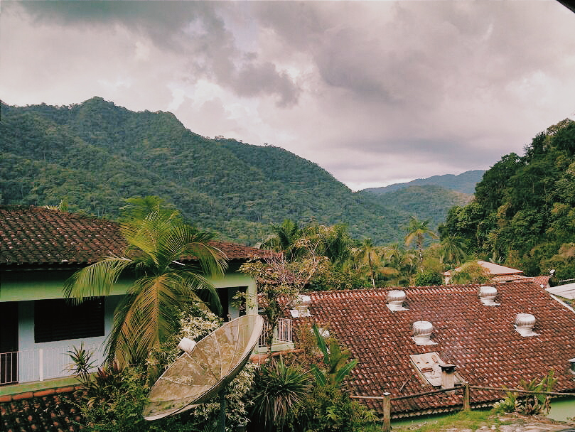 Pousada com sua linda vista para o grande PETAR no interior de São Paulo